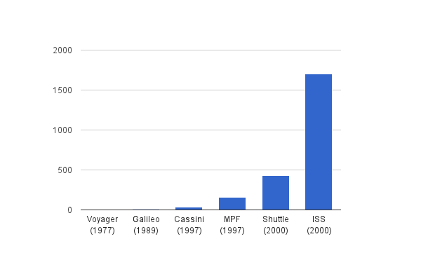 Evolution du nombre de lignes de codes au sein de projets aerospatiaux